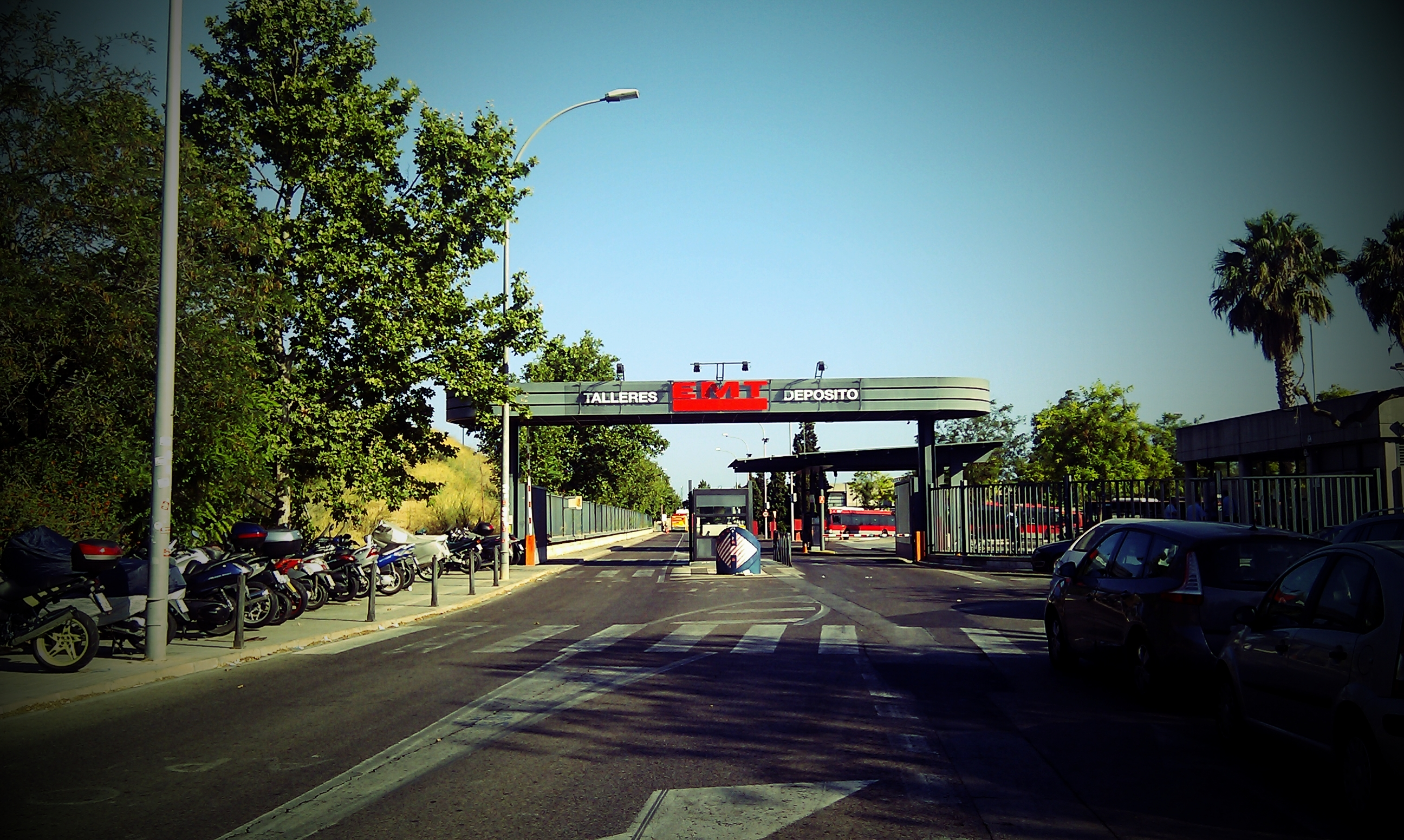 Sant Isidre